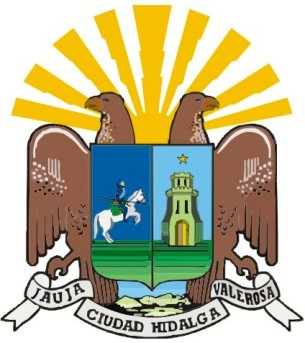 Escudo de la ciudad de jauja